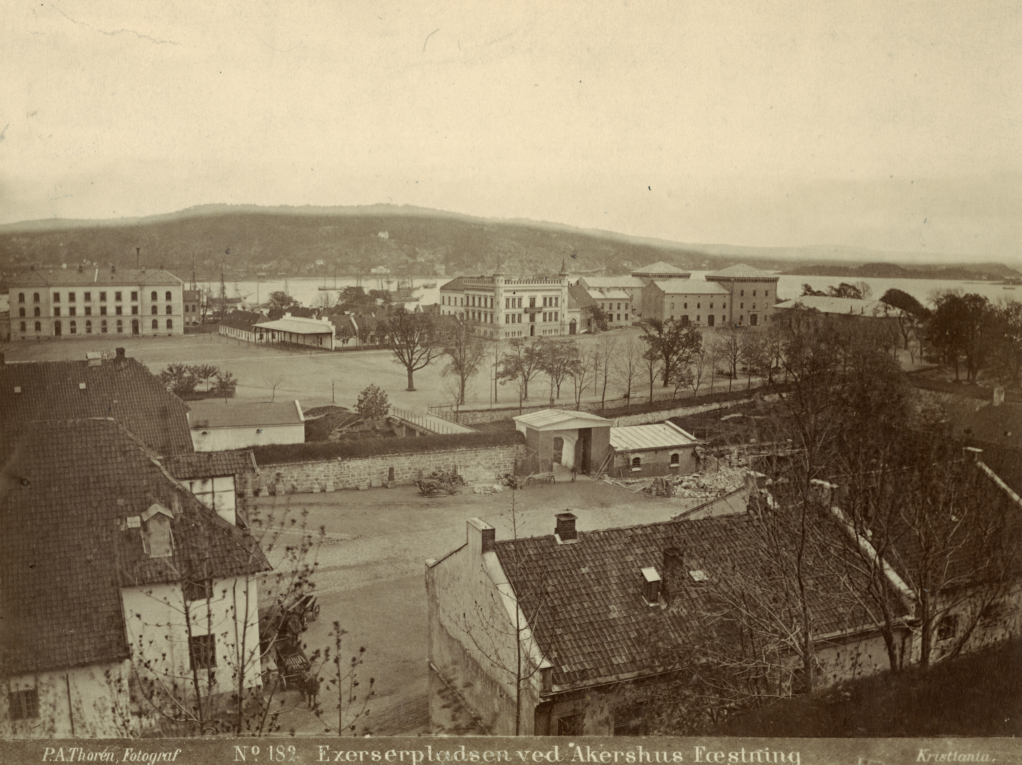 Akershus festning i Oslo, Oslo Nedre festning.